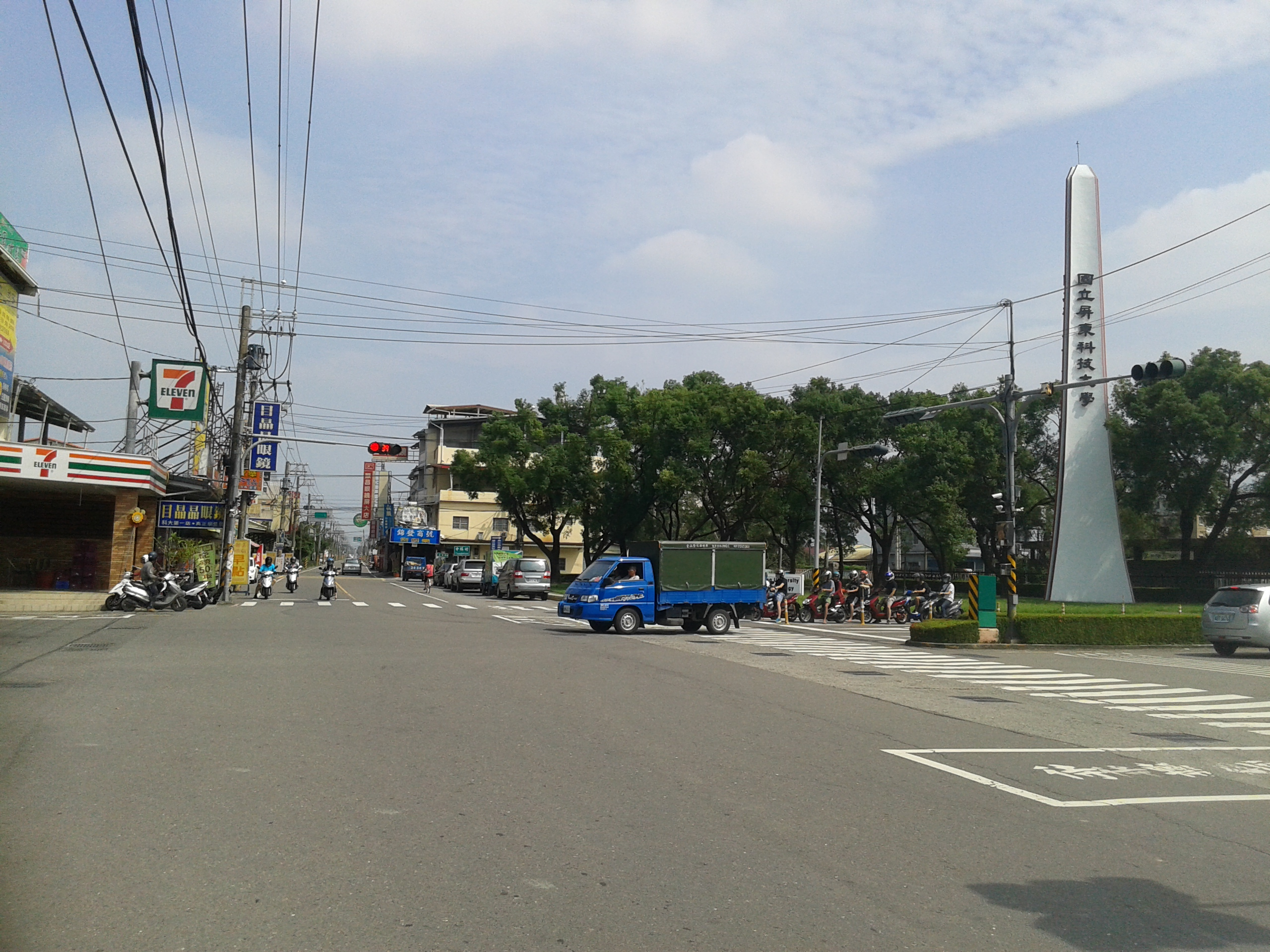 中文（台灣）: 壽比路與學府路口 (縣道187號)／國立屏東科技大學校門口